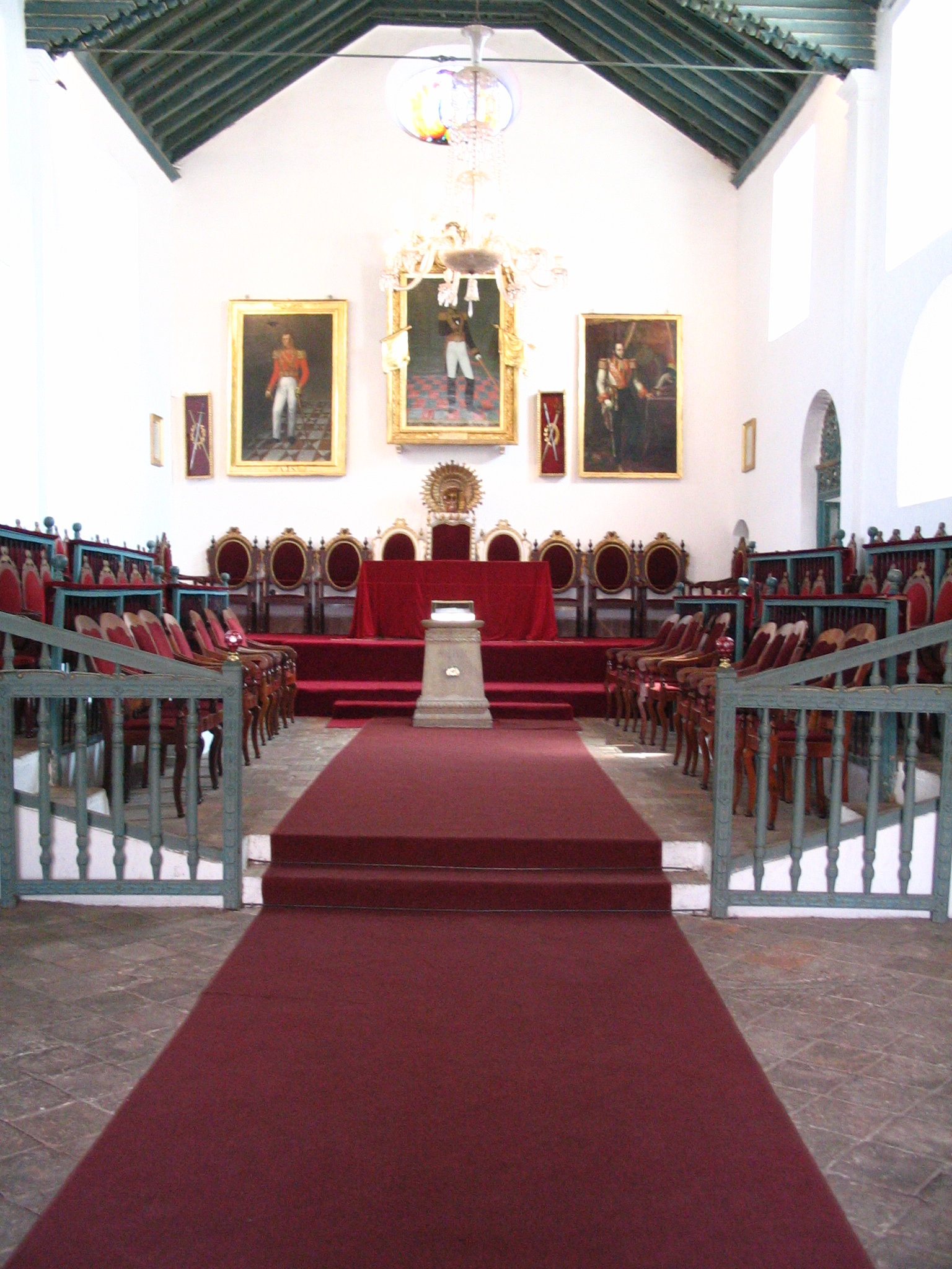 C'est dans cette salle que fut signée l'indépendance de la Bolivie. Cet édifice se trouve à Sucre. Author: User:Anakin